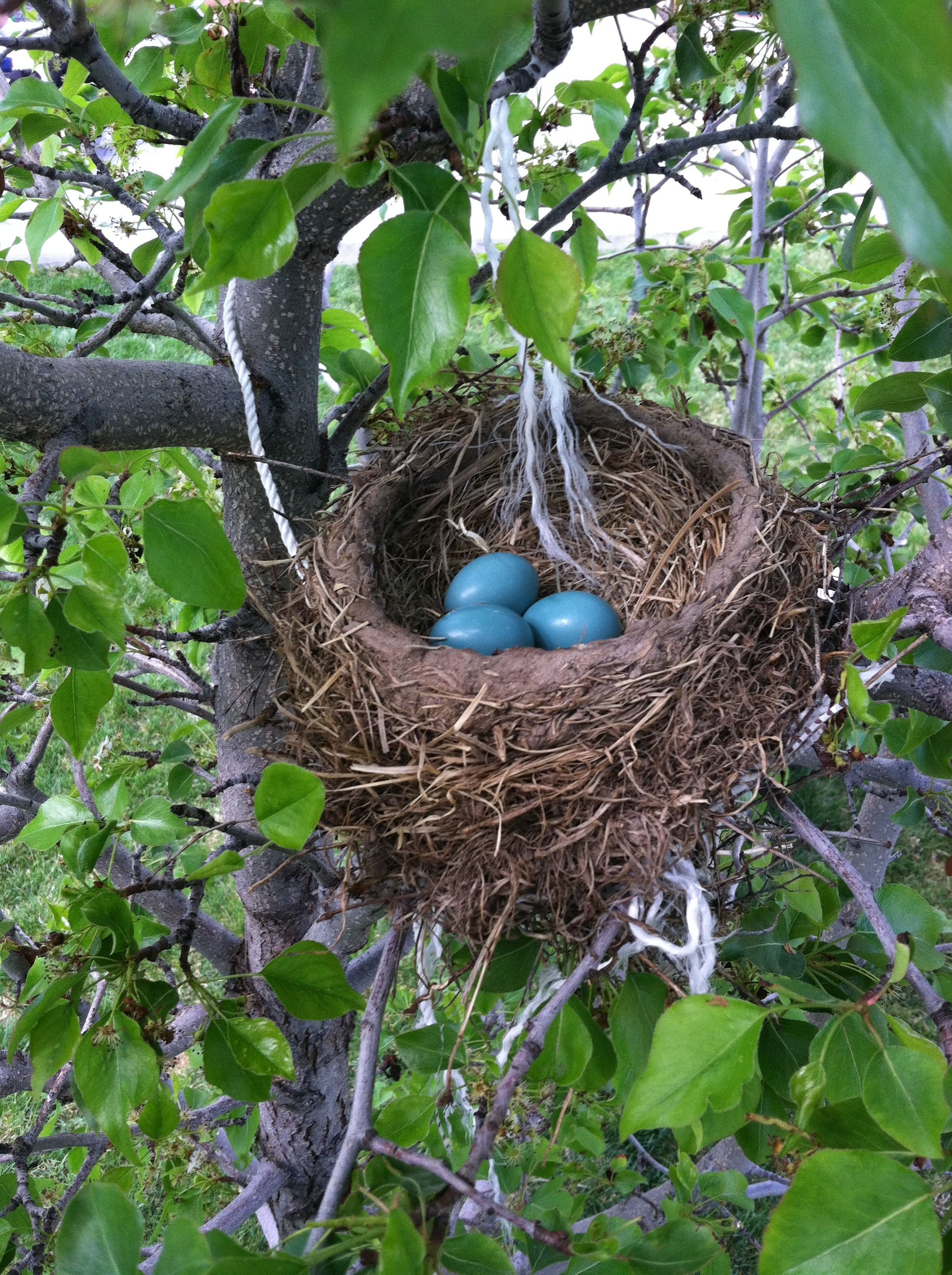 Huevos de turdus migratorius color azul, nido de jardin.